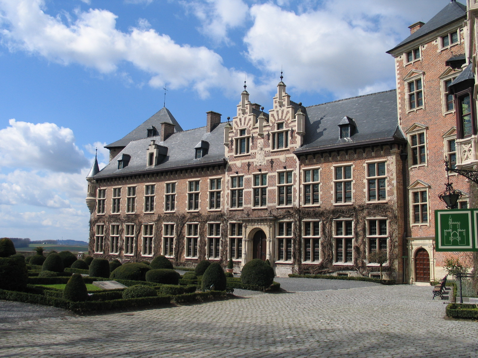 Achtergevel van de rechtervleugel - eigen foto